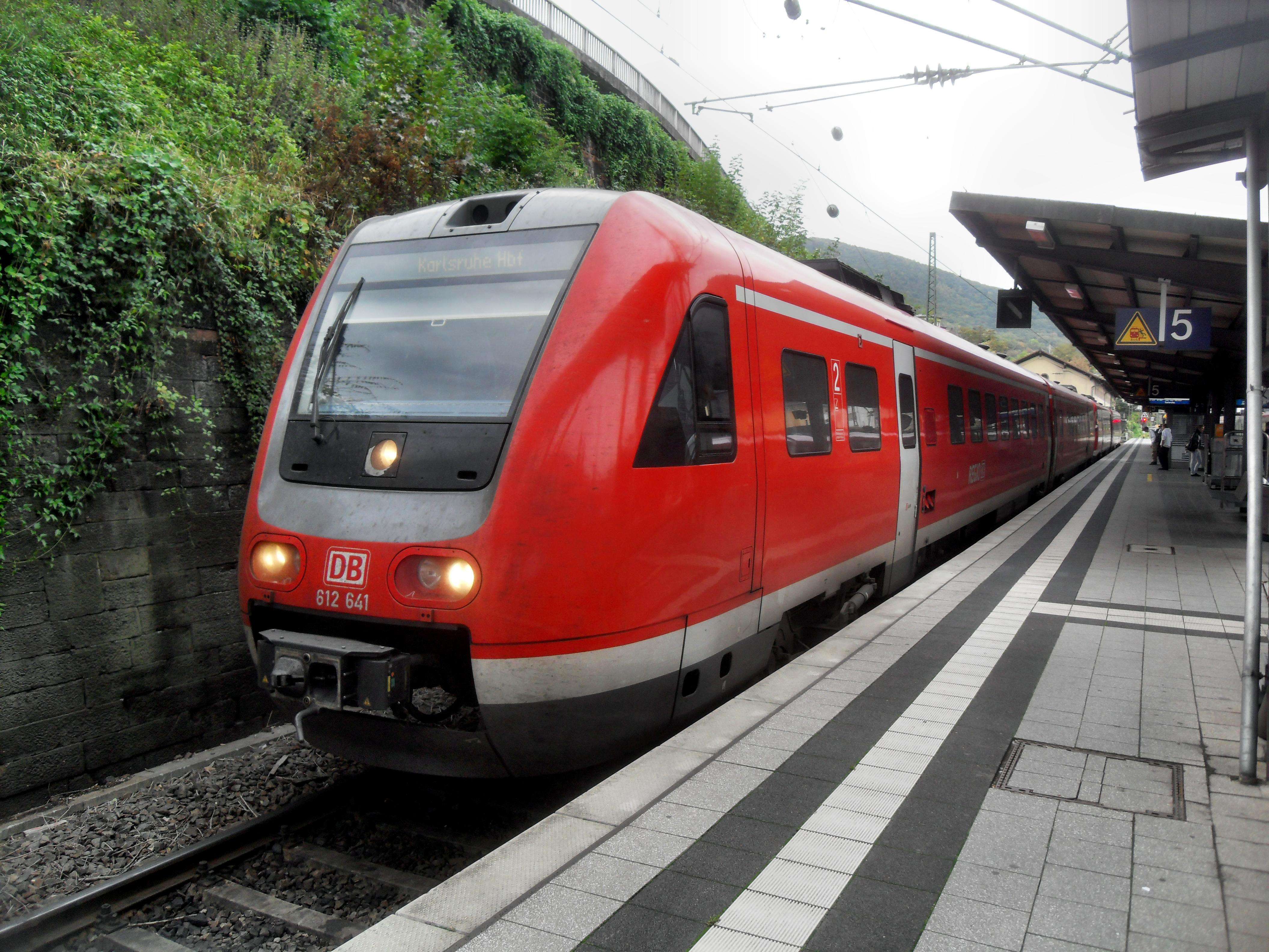 Regional-Express mit Triebwagen der DBAG-Baureihe 612 im Neustädter (Weinstraße) Hauptbahnhof in Rheinland-Pfalz auf dem Weg nach Karlsruhe in Baden-Württemberg